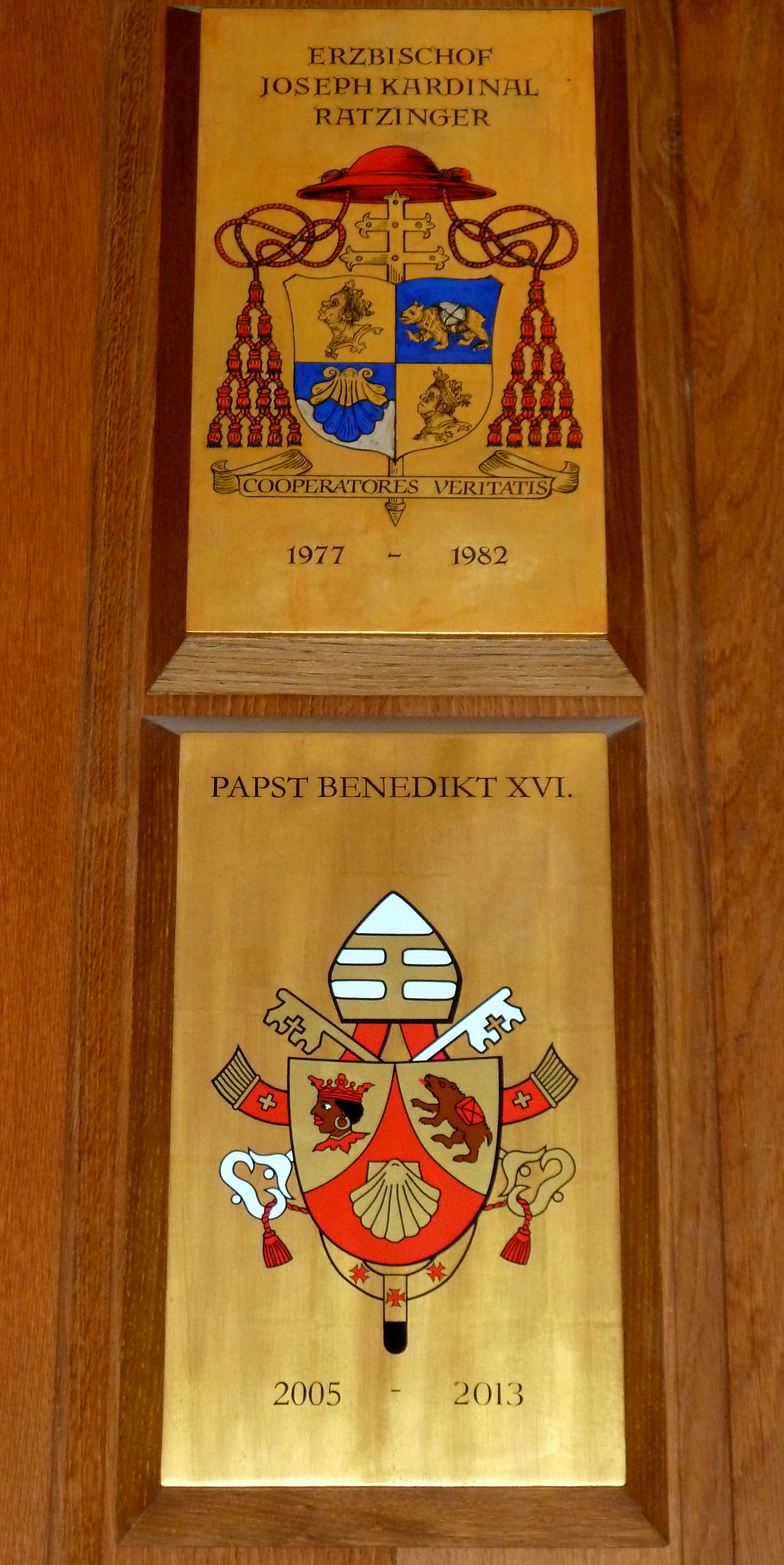 Das Papst- und das erzbischöfliche Wappen von Benedikt XVI. / Joseph Kardinal Ratzinger an der holzernen Chorwand des Münchner Liebfrauendoms mit Zeitraum seines Pontifikats und Episkopats. Eingeschnitten ins Holz, farbig bemalt, vergoldet. Eingeweiht in 2013